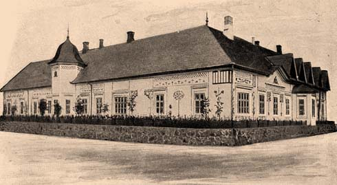 Vojčice lovecký zámoček